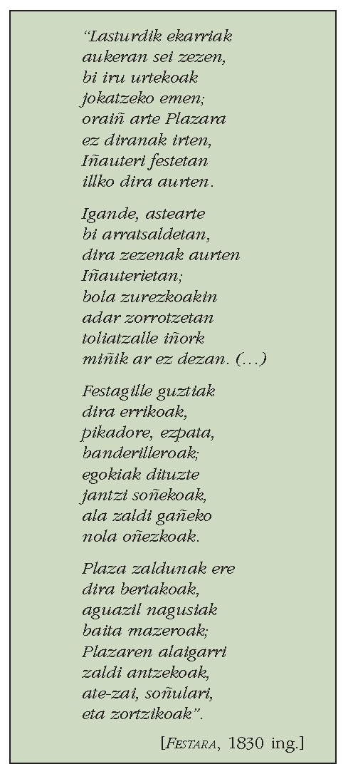 Jose Bizente Etxagarairen testu bat, Festara liburutik hartua, 1830. urtearen ingurukoa